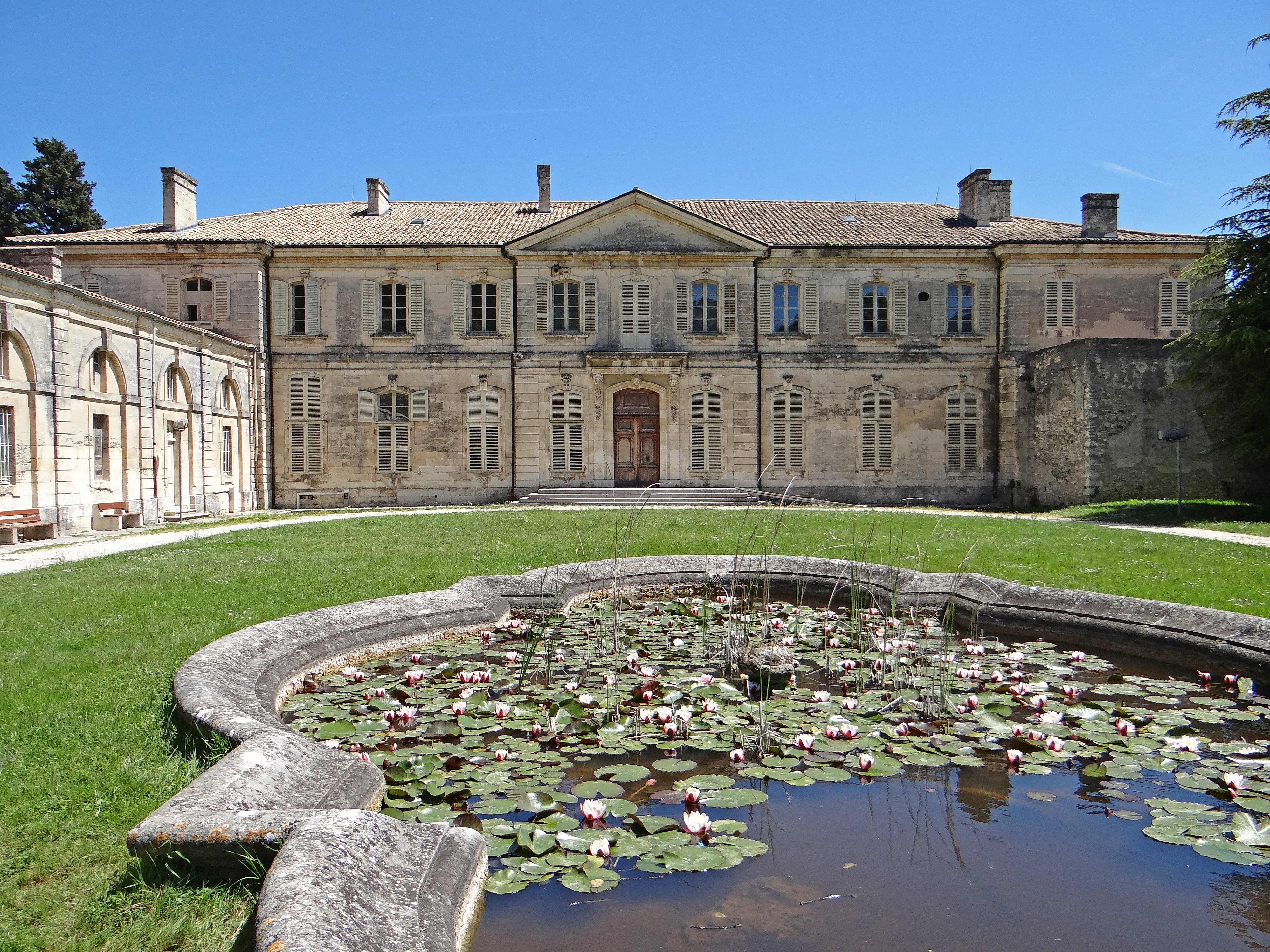 Évêché de Viviers - Façade sur cour